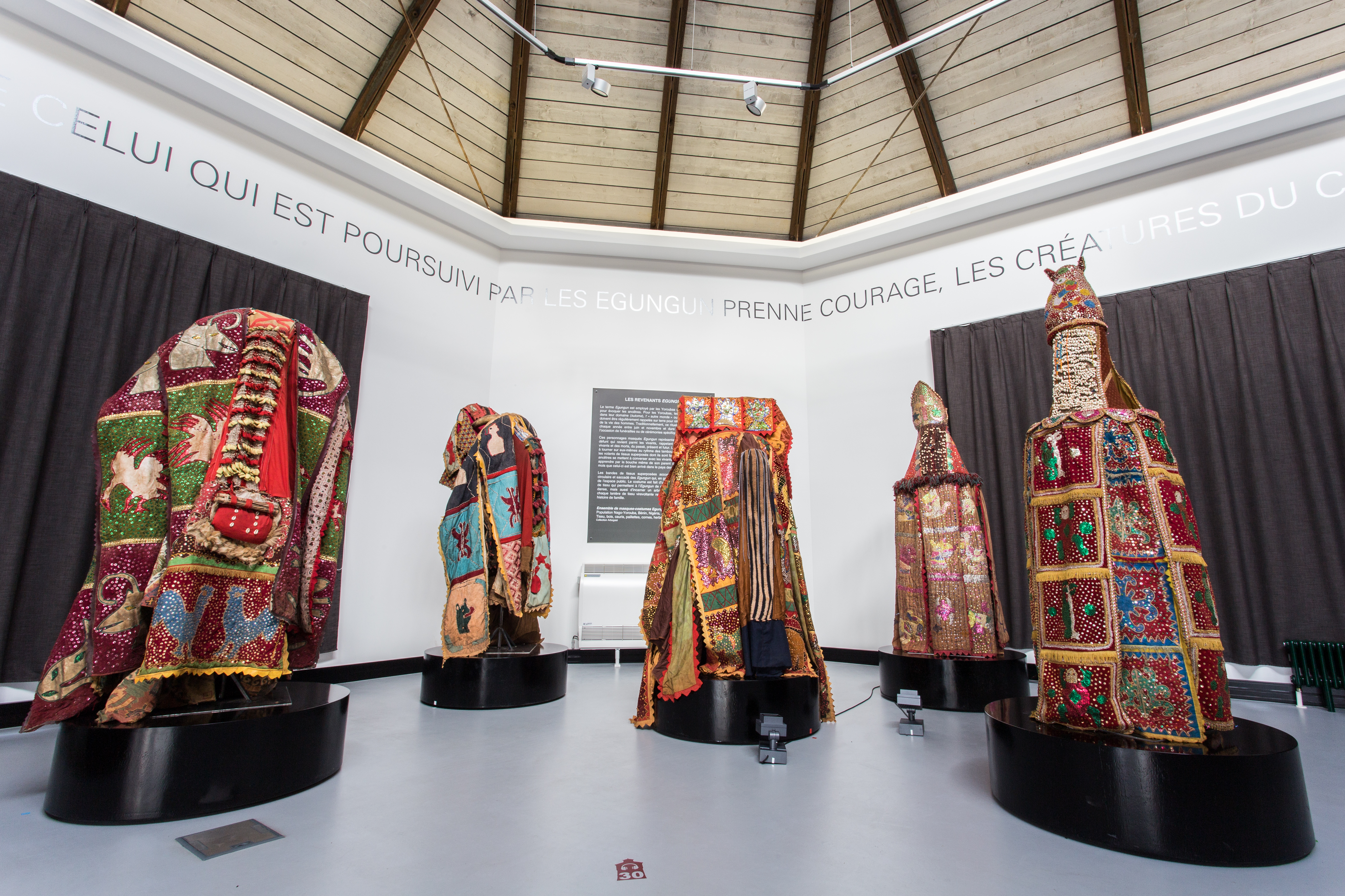 Chez les Yoruba, les masques des sociétés d’Egun sont constitués d'un ensemble de panneaux de tissus bigarrés et richement ornés. Au niveau du visage, une sorte de boîte maintient le textile et un filet permet au danseur de voir.Les mascarades Egungun insistent sur la présence ancestrale. Par leur danse lente et majestueuse pendant laquelle tous les panneaux du costume s'écartent et volent, ils invitent les ancêtres à être présents parmi les humains. De nos jours, ces rituels des revenants perdurent et s'ils sont des spectacles, ils gardent leur caractère religieux. Photo d’une exposition du château Vodou de Strasbourg.